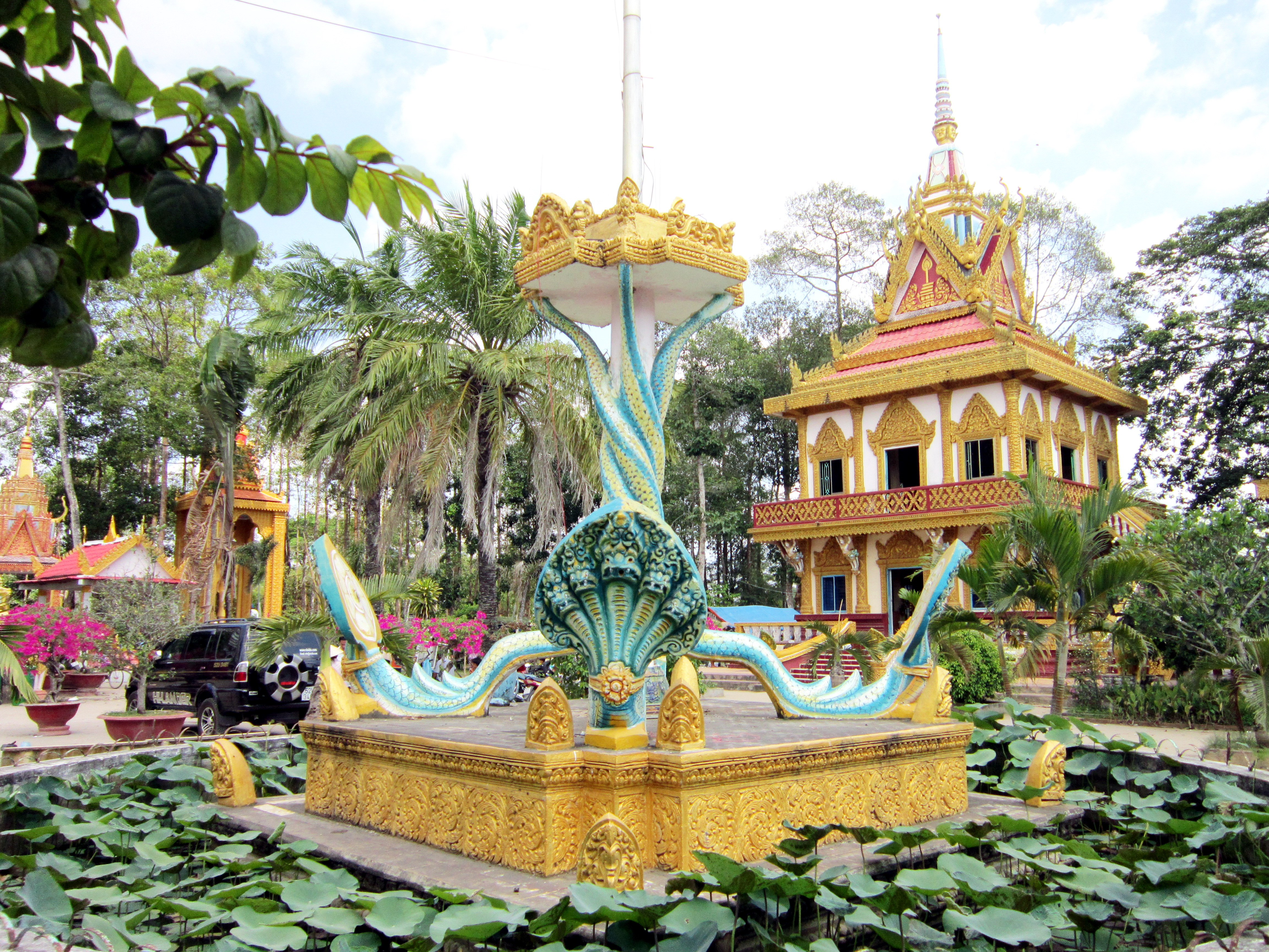 Cột cờ chùa Sà Lôn (tiếng Khmer: Wath Sro Loun hay Wath Chro Luông, tục gọi là chùa Chén Kiểu). Đây là một ngôi chùa cổ thuộc hệ phái Phật giáo Nam tông Khmer; thuộc xã Đại Tâm, huyện Mỹ Xuyên, tỉnh Sóc Trăng, Việt Nam.